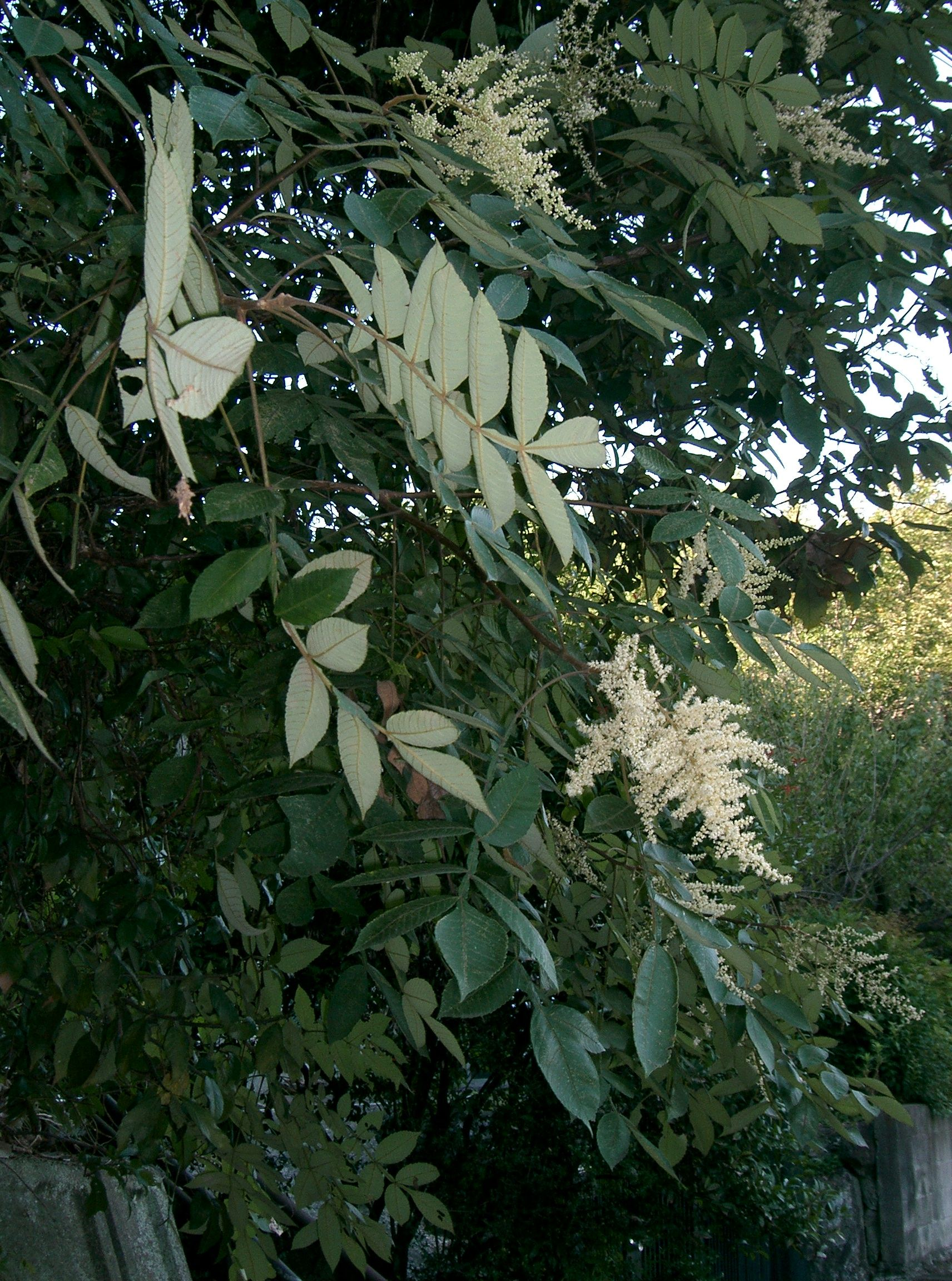 Rhus chinensis